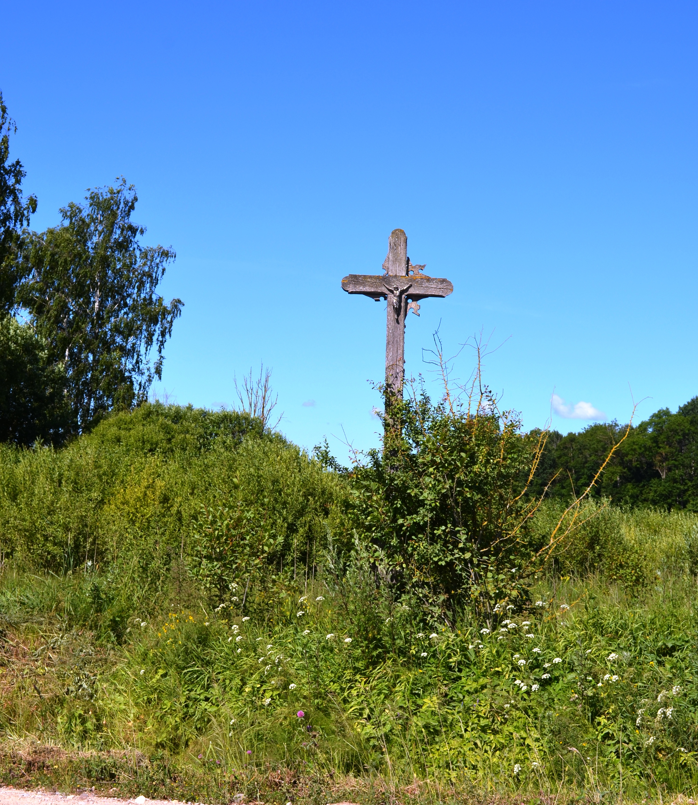 Kryžius, Būdai (prie Skaistgirių), Kėdainių raj.